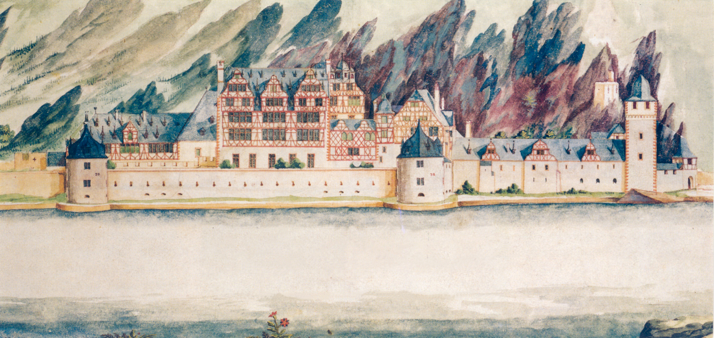 Ansicht des Schlosses Philippsburg in Braubach